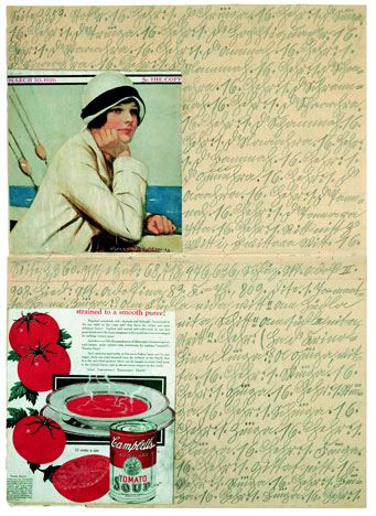 Campbell’s Tomato Soup, 1929. Seite 3359 aus dem Heft Trauermarsch. Bleistift, Collage auf Zeitungspapier. 70 x 50 cm; Adolf-Wölfli-Stiftung, Kunstmuseum Bern